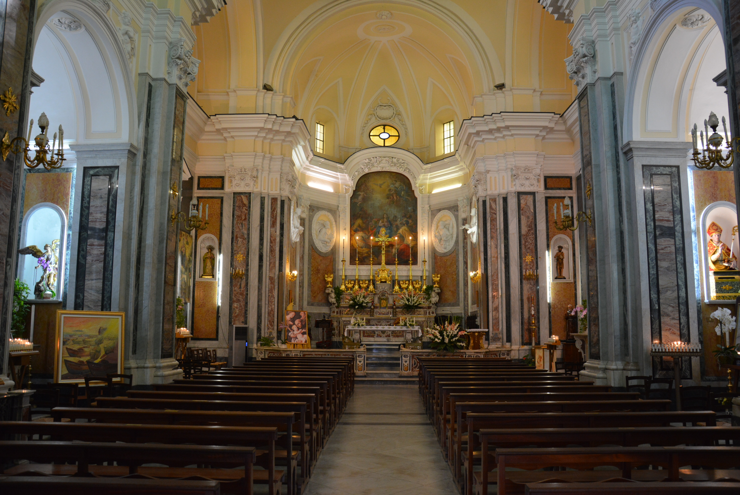 Chiesa dello Spirito Santo a Ischia